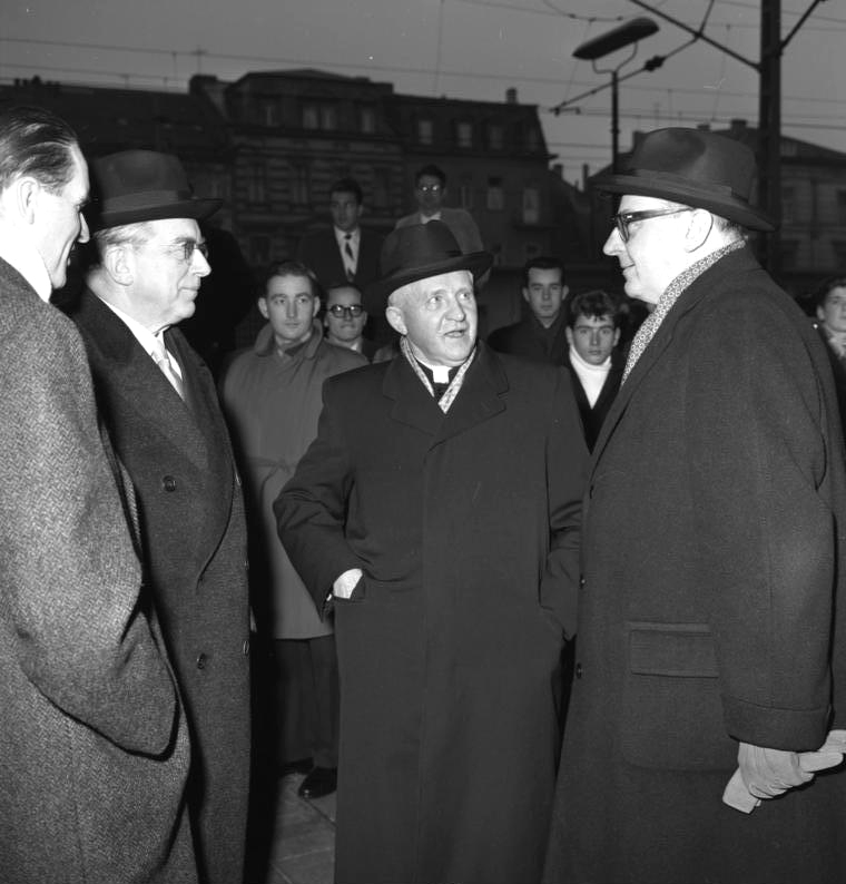 Abfahrt des apostolischen Nuntius, Muench, vom Bonner Bahnhof nach Rom.